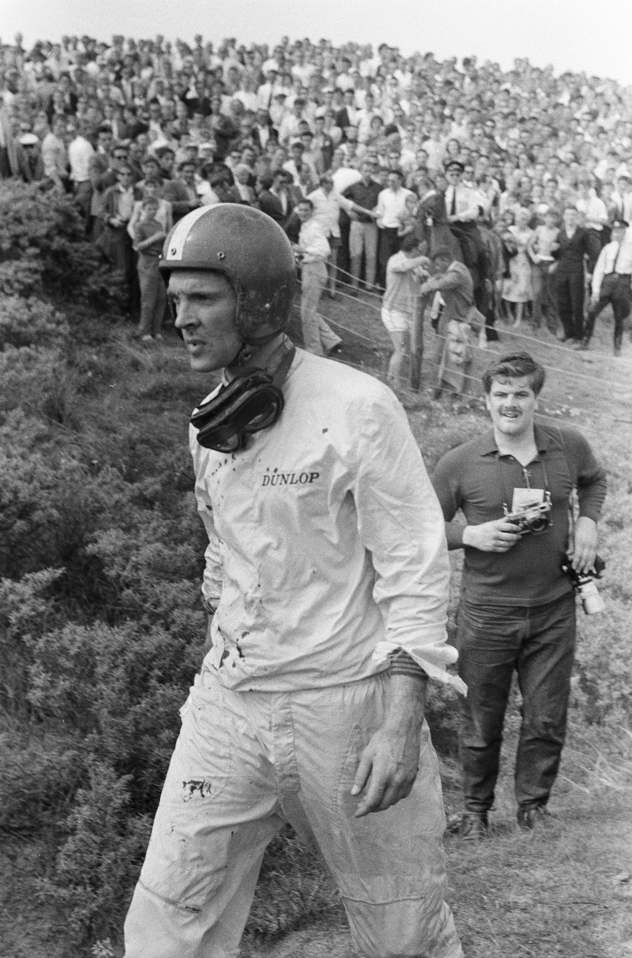 Collectie / Archief : Fotocollectie Anefo Reportage / Serie : Autoraces op het circuit van Zandvoort. Dan Gurney wandelt terug naar de pits nadat hij in de Tarzanbocht rechtuit is gereden en over de hekken is gevlogen met zijn BRM F1 wagen door een defect aan de remmen. Hierbij kwam jammerlijk een jonge toeschouwer Beschrijving : Autoraces op het circuit van Zandvoort. Dan Gurney wandelt terug naar de pits nadat hij in de Tarzanbocht rechtuit is gereden en over de hekken is gevlogen met zijn BRM F1 wagen door een defect aan de remmen. Hierbij kwam jammerlijk een jonge toeschouwer om het leven. Datum : 6 juni 1960 Locatie : Noord-Holland, Zandvoort Trefwoorden : auto's, coureurs, ongelukken, sport Persoonsnaam : Gurney Dan Fotograaf : Fotograaf Onbekend / Anefo Auteursrechthebbende : Nationaal Archief Materiaalsoort : Negatief (zwart/wit) Nummer archiefinventaris : bekijk toegang 2.24.01.05 Bestanddeelnummer : 911-3165